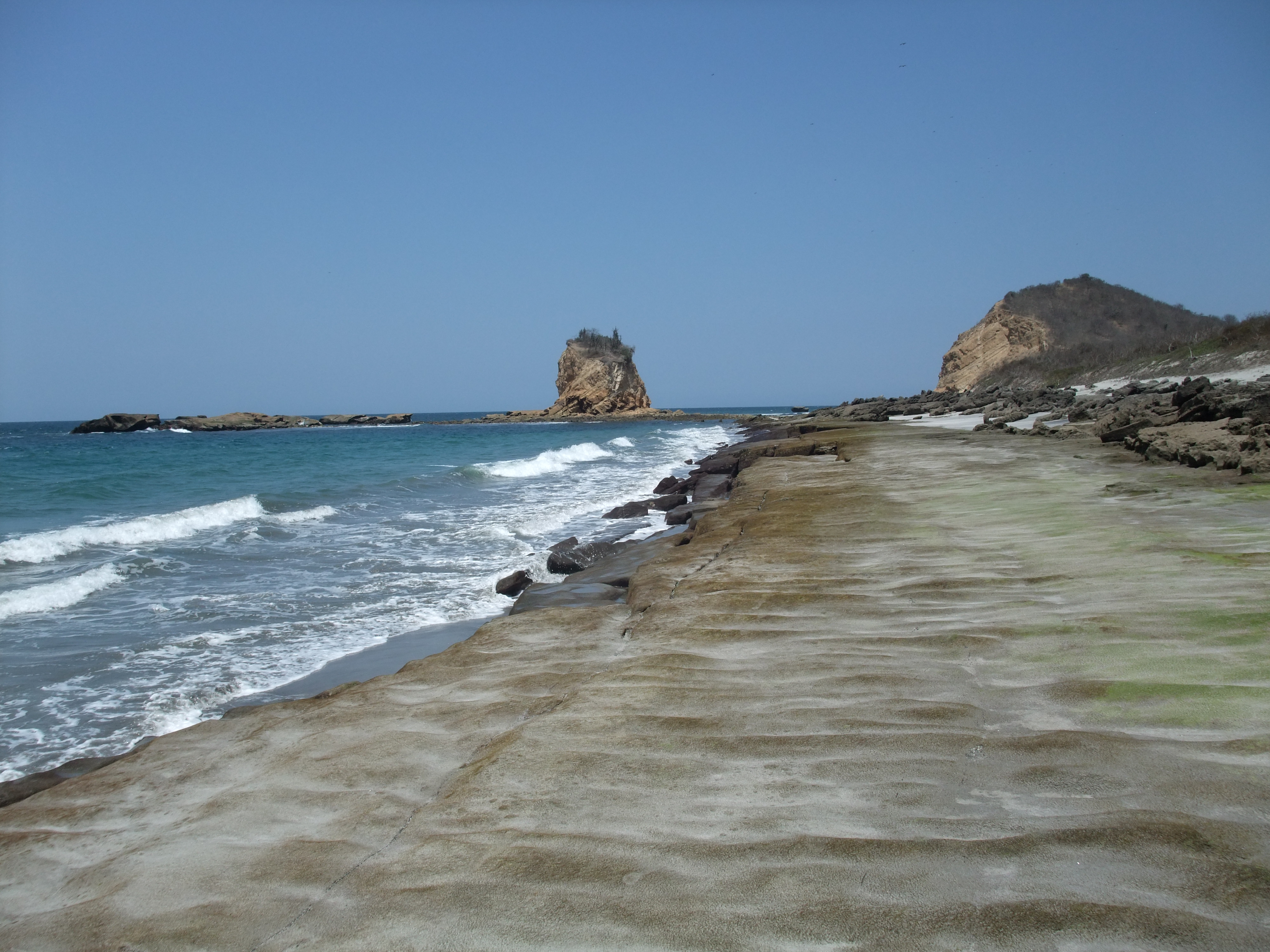 Küste mit Felsen im Nationalpark Machalilla in Ecuador